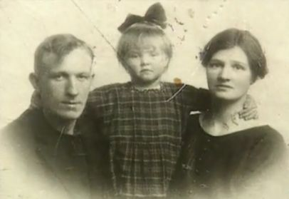 Anton Jakobsen med familie, i eller før 1935.